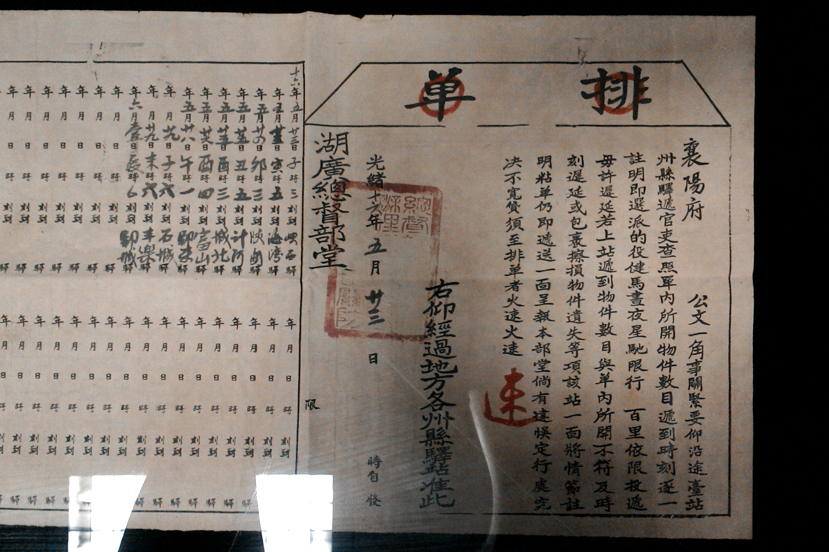 光緒十六年五月廿三日襄陽府排單,台北市中正區南門次分區龍福里